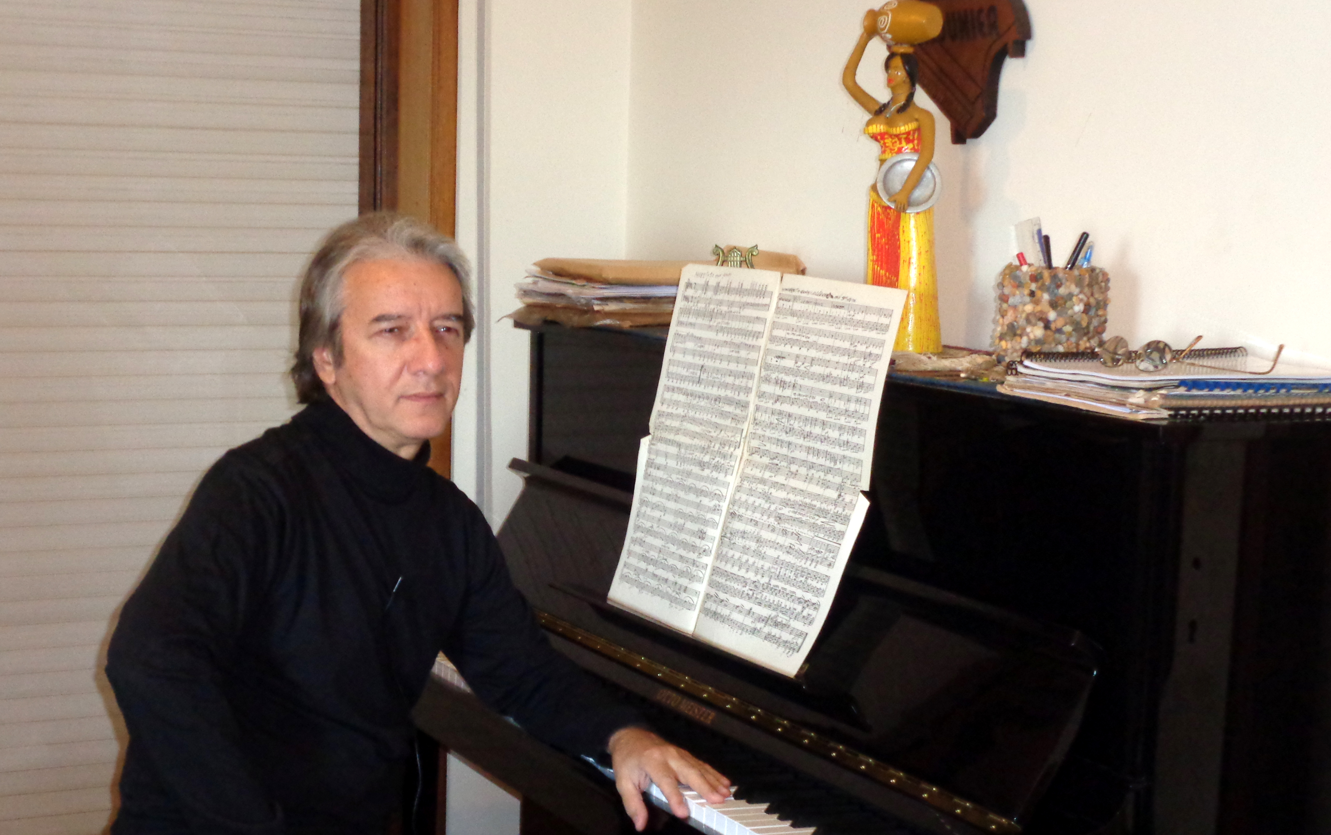 Compositor André Lamounier